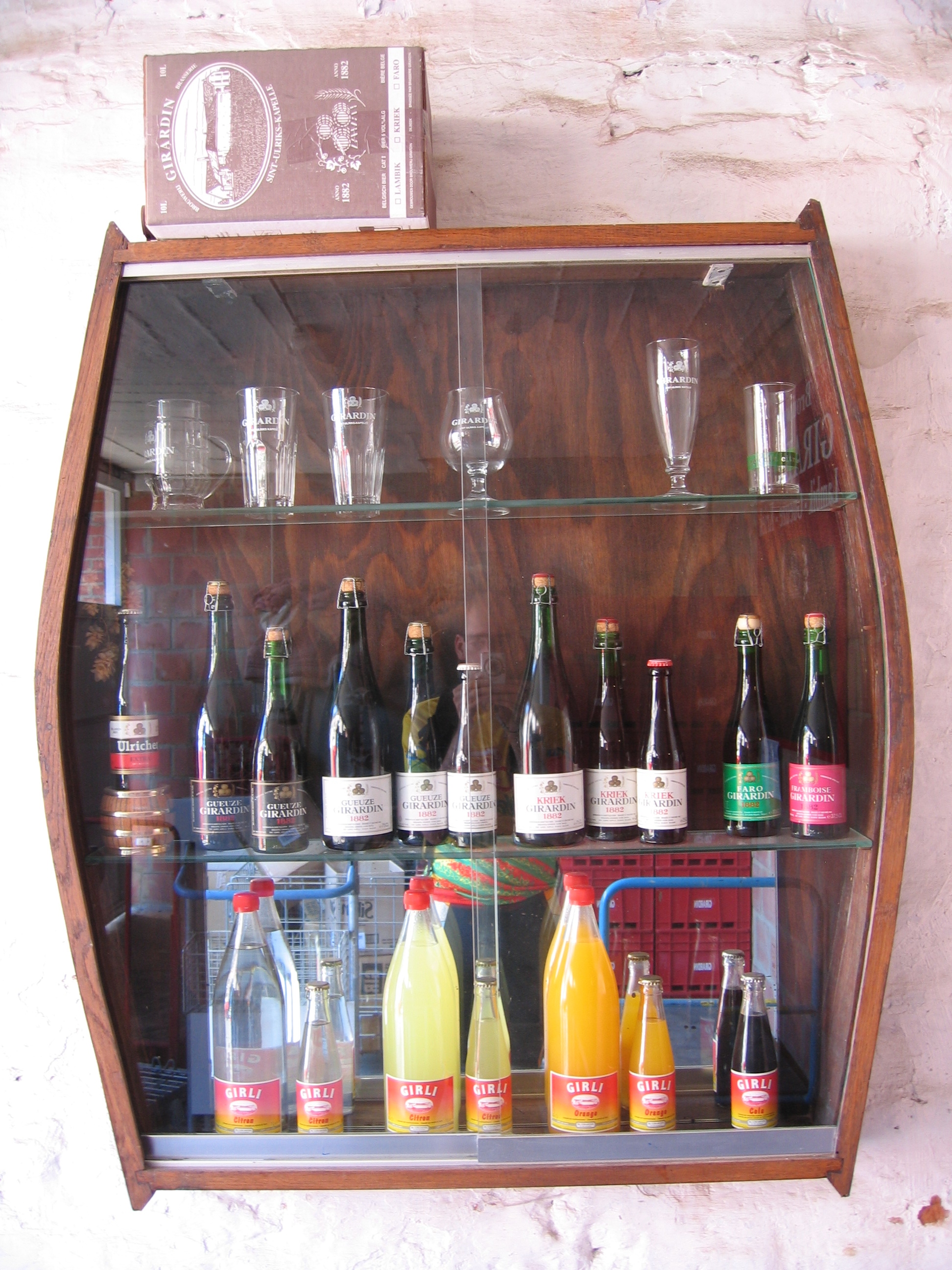 Cette photo est la seule autorisée à l'intérieur de la brasserie. Le photographe de Jef van den Steen est le seul à avoir été autorisé à prendre d'autres photos pour son livre Geuze en kriek. De champagne onder de bieren.